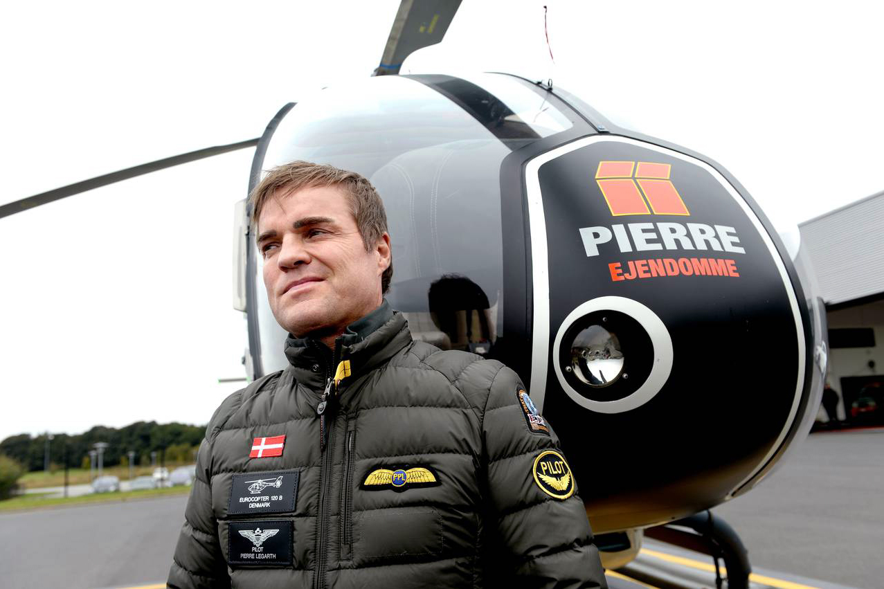 Pierre Legarth ved sin Eurocopter 120 B